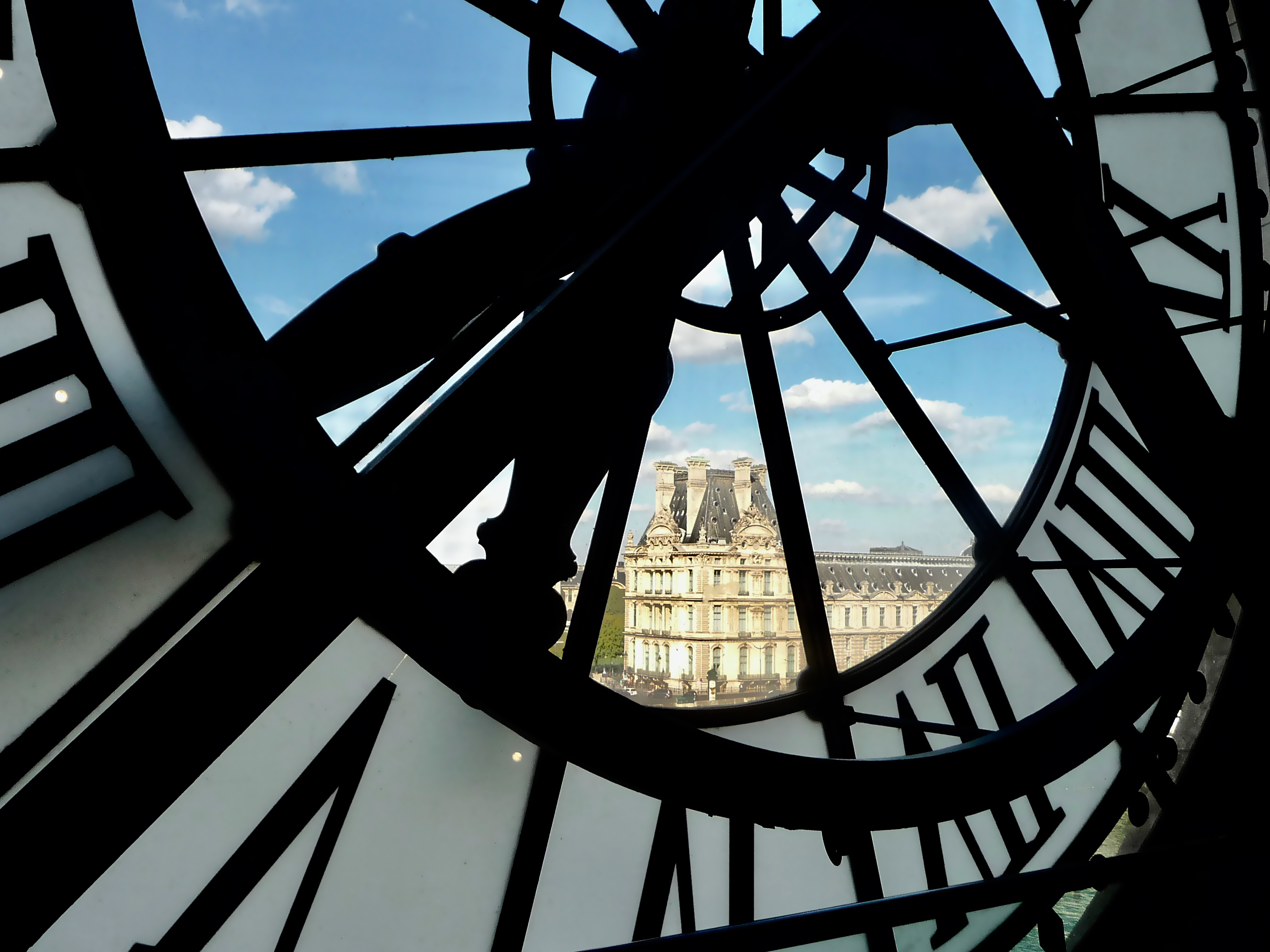 Musée d'Orsay, Paris: l'horloge de la gare.